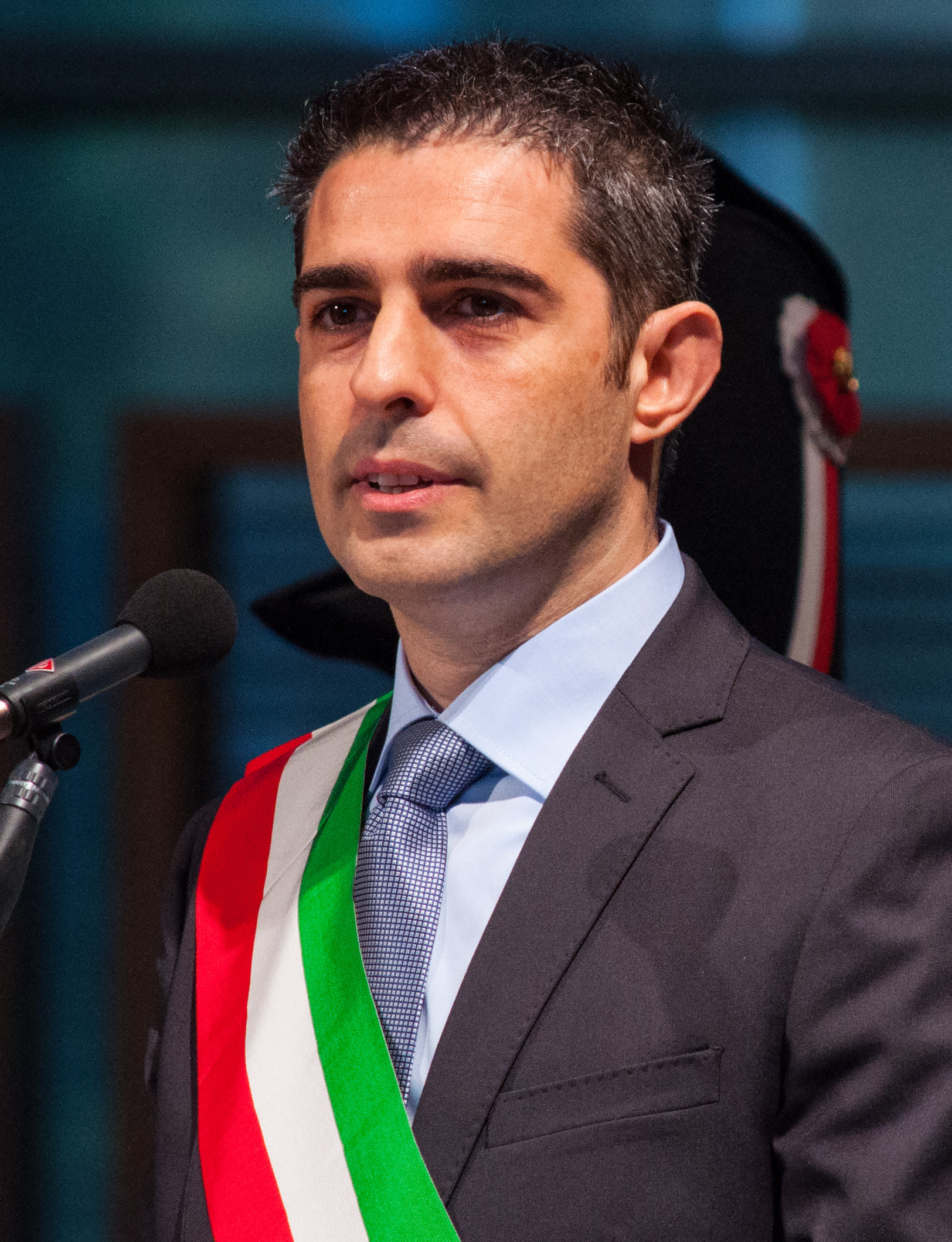 Federico Pizzarotti durante la visita a Parma di Aung San Suu Kyi.